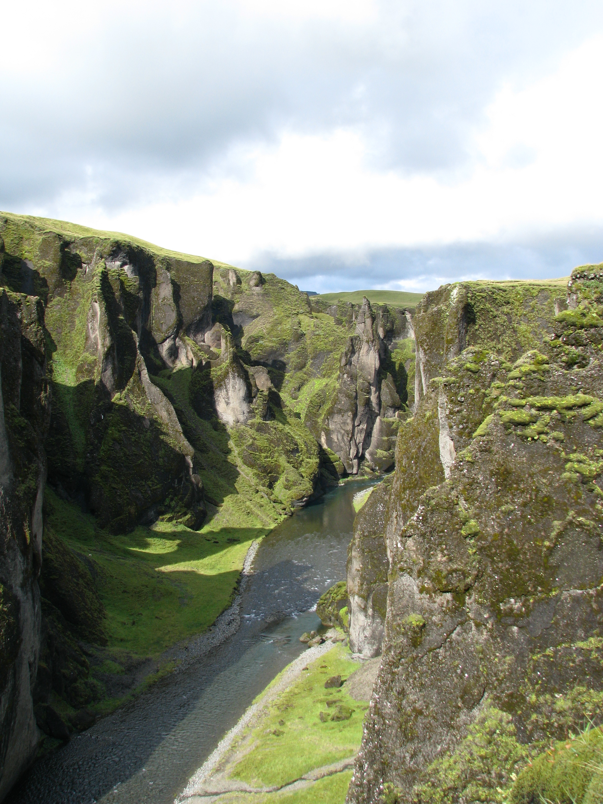 Fja[rárgljúfur, IJsland